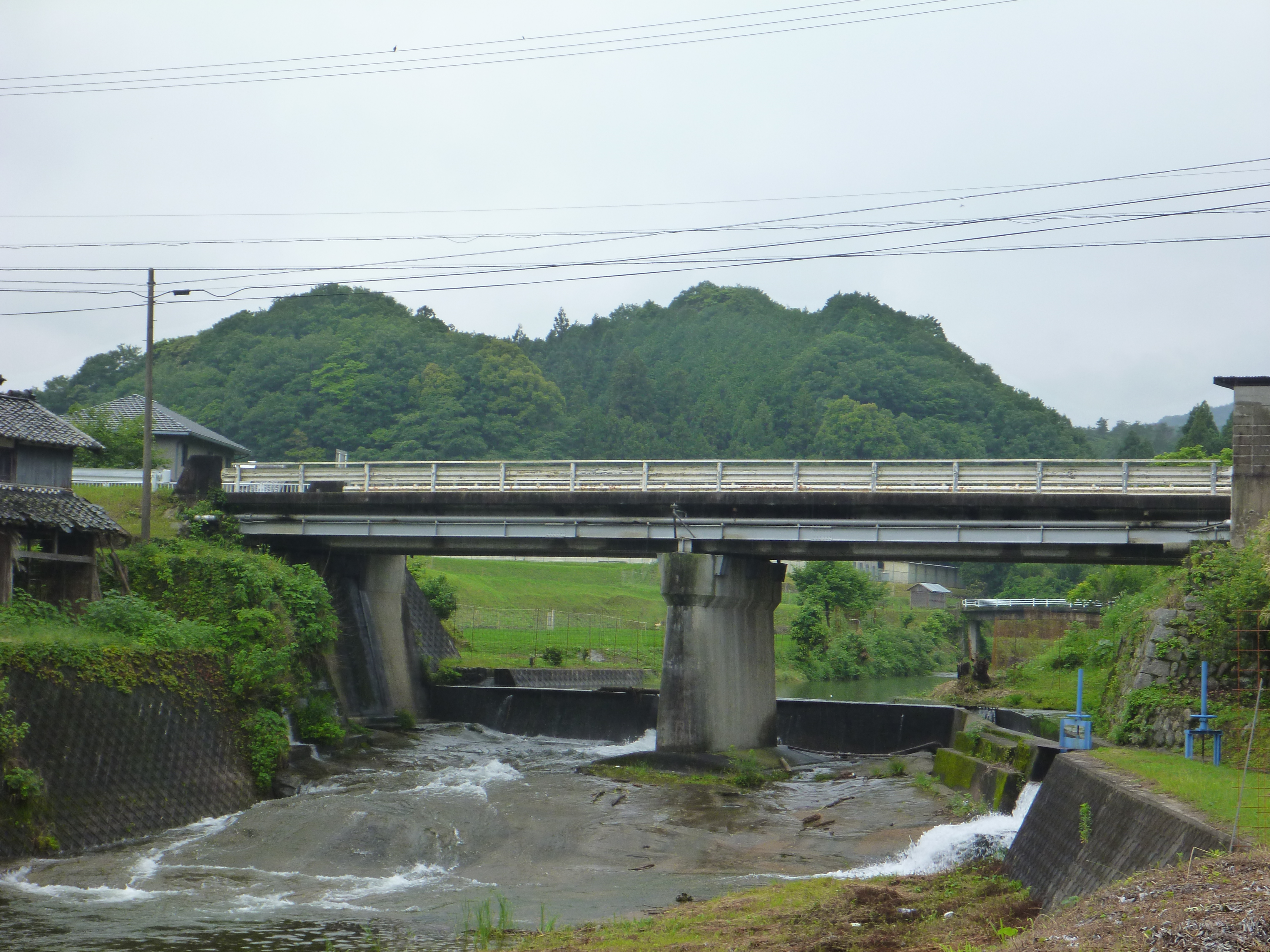 戸田川橋の画像